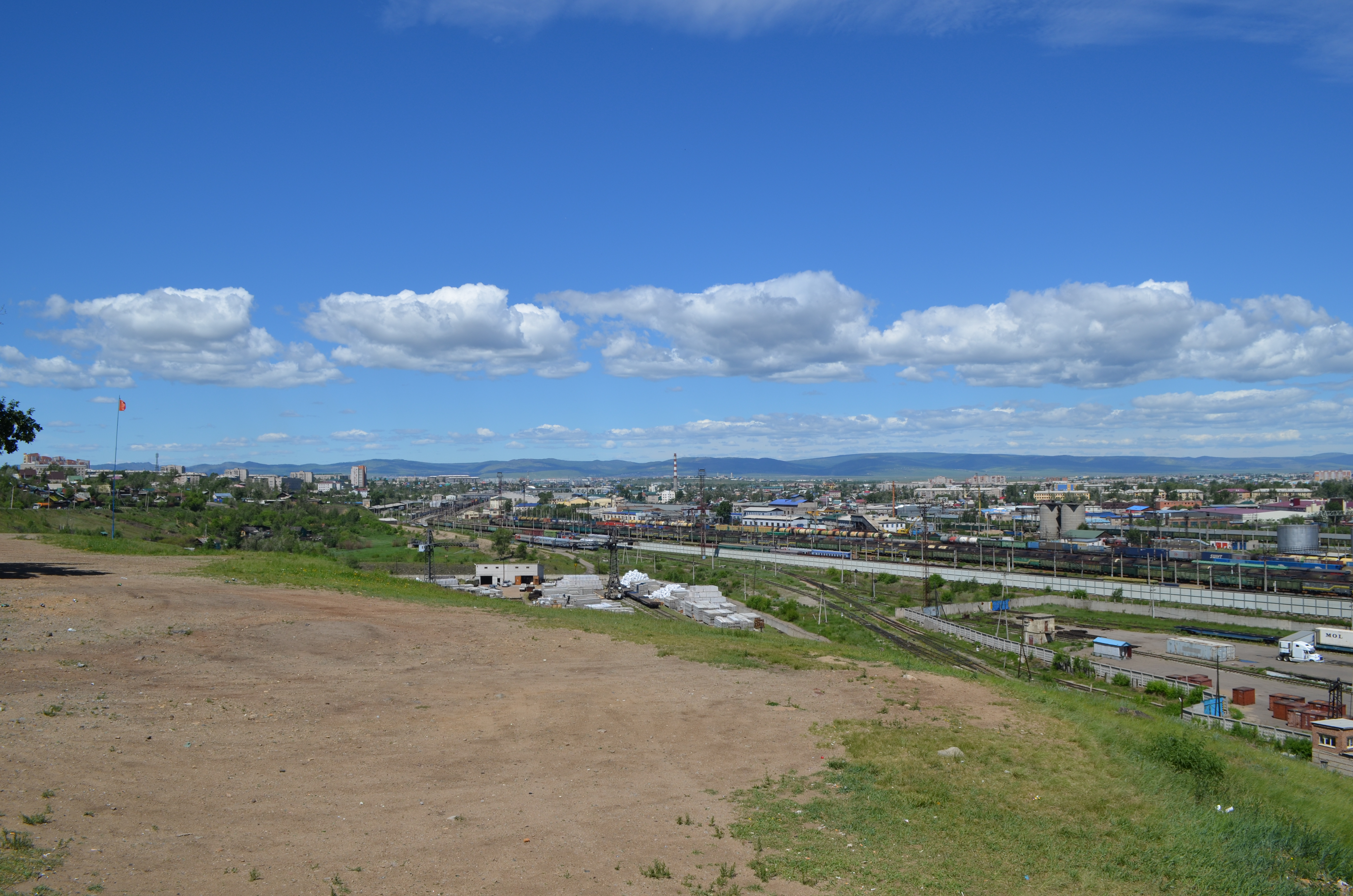 снимки конца июня - начала июля 2015 г.